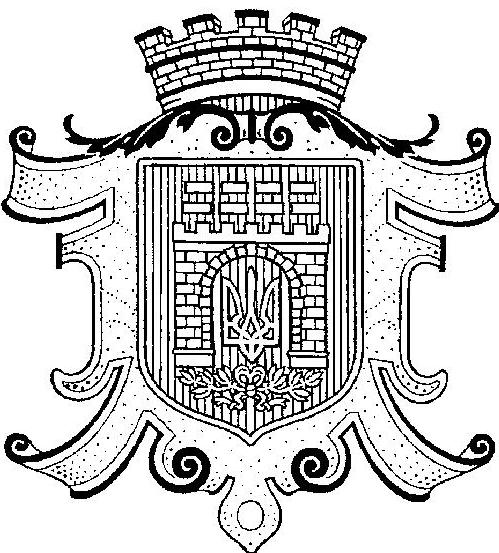 Черно-белый герб Черновцов